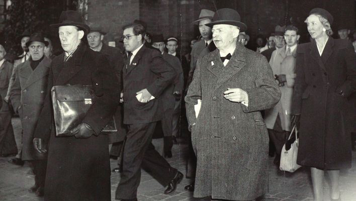 Nils Andersson vid Malmö centralstation 1947, efter att ha beviljats resning i Esarpsmålet. Från Dagens Nyheter 2017-01-06 del 1 sid 7.